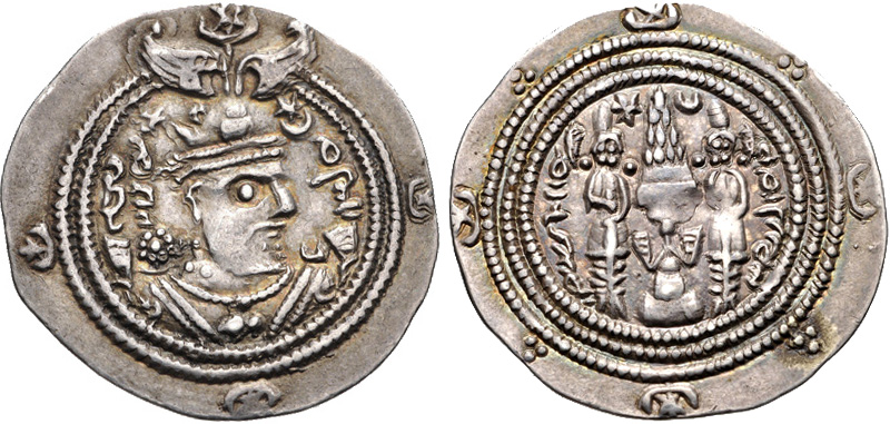 Dābūyid Ispahbads of Tabaristan.